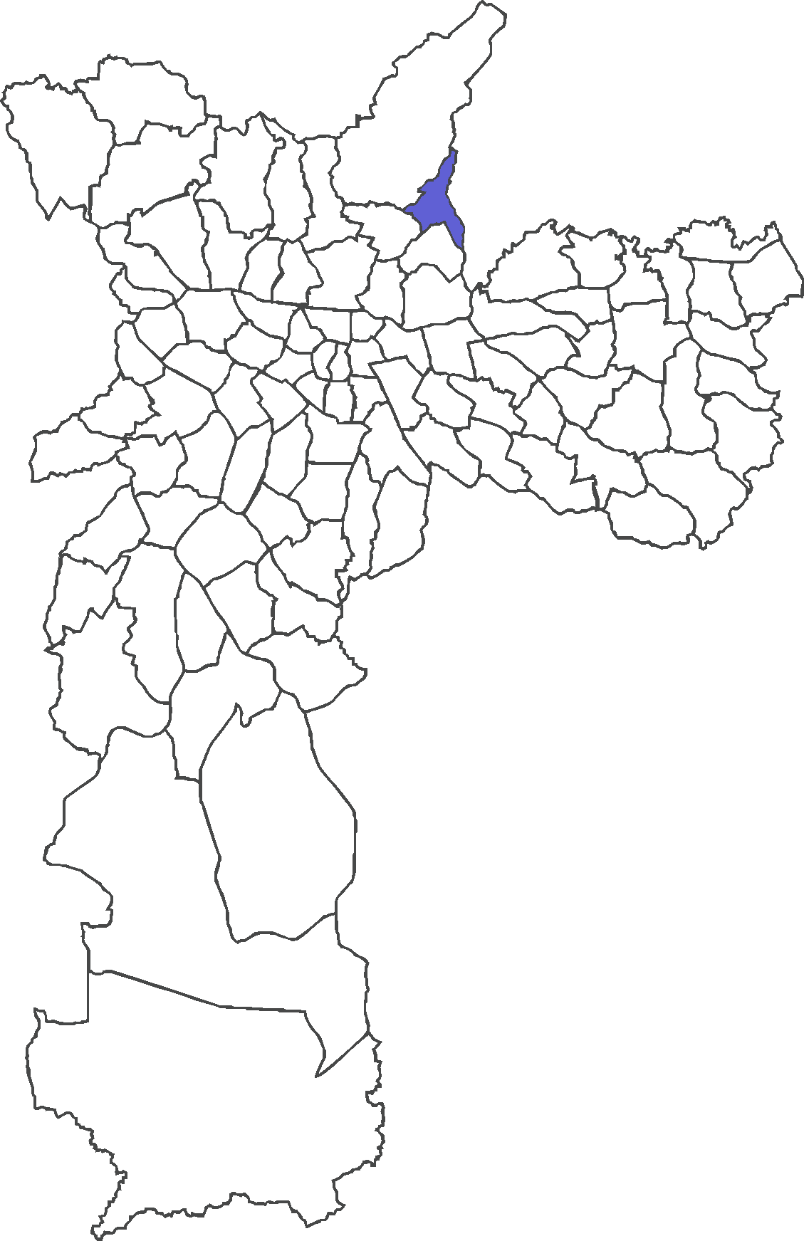 Localização do distrito de Jaçanã no município de São Paulo.